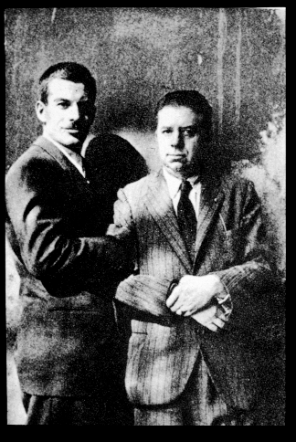 Elio Vittorini ed Eugenio Montale.